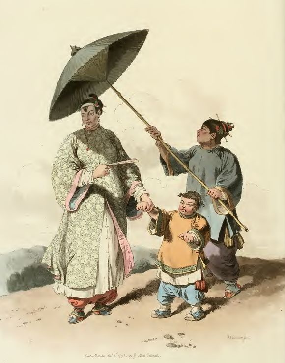 中文（台灣）: 清朝中國的婦女、小孩和女僕